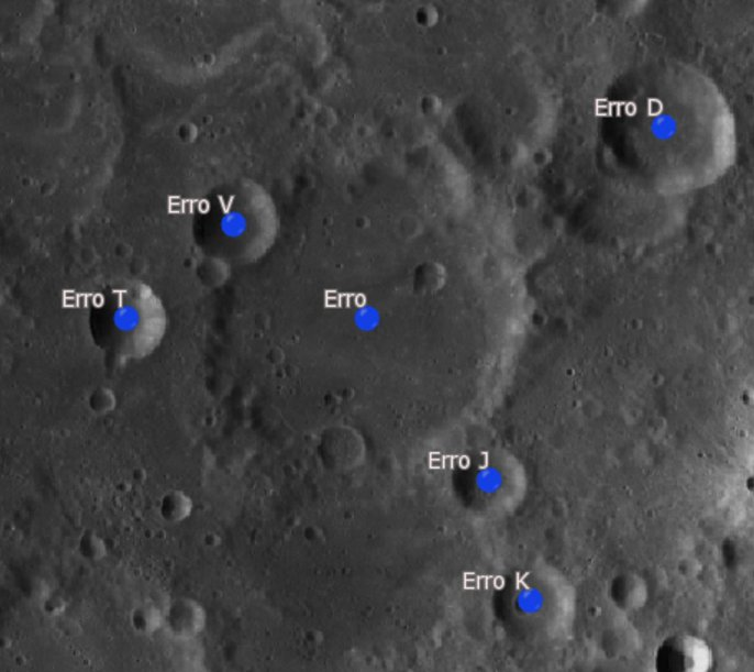 Cráter lunar Erro. Cráteres satélite. (Imagen LROC)